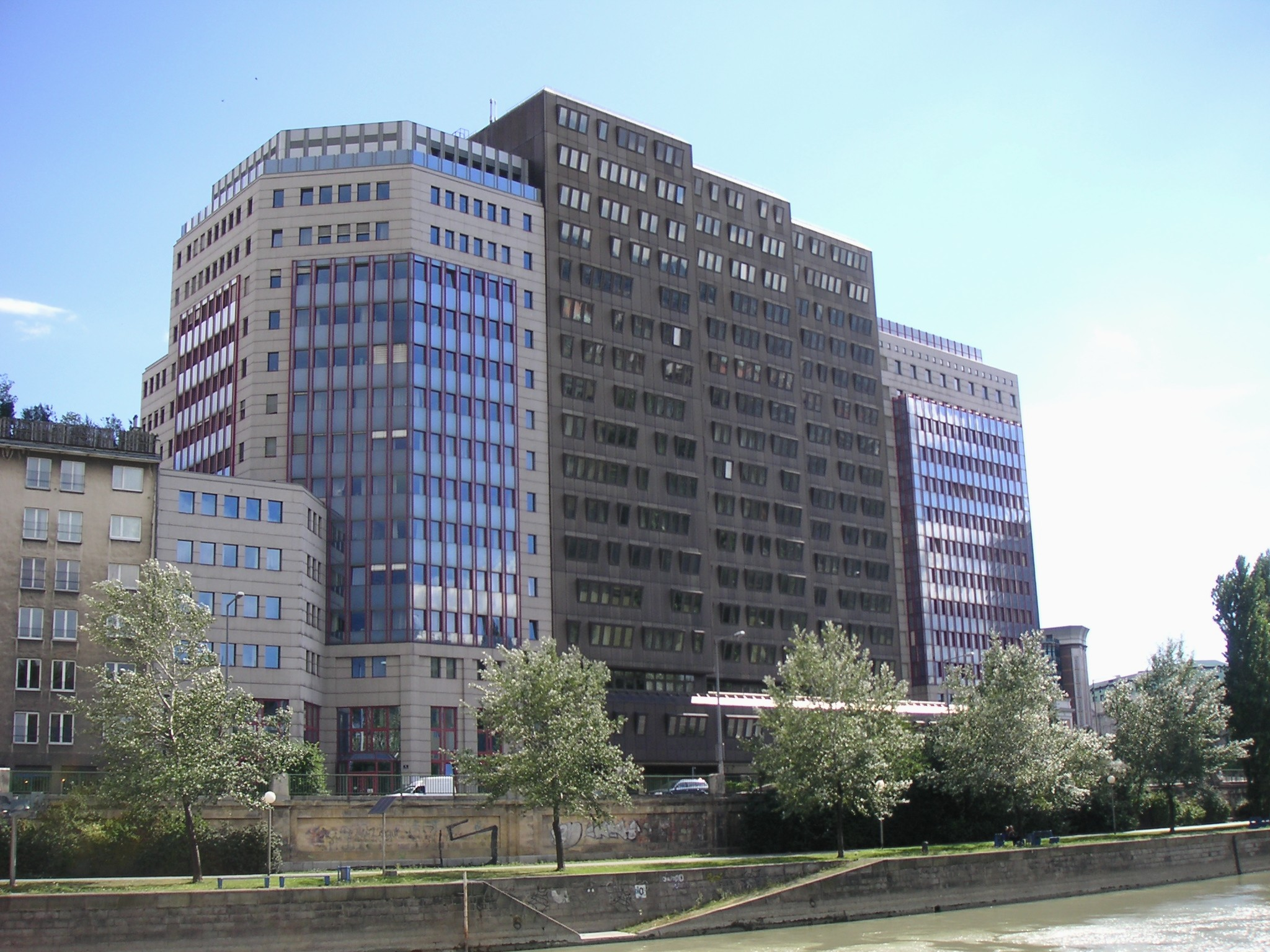 Rechnungshof in Vienna, Austria